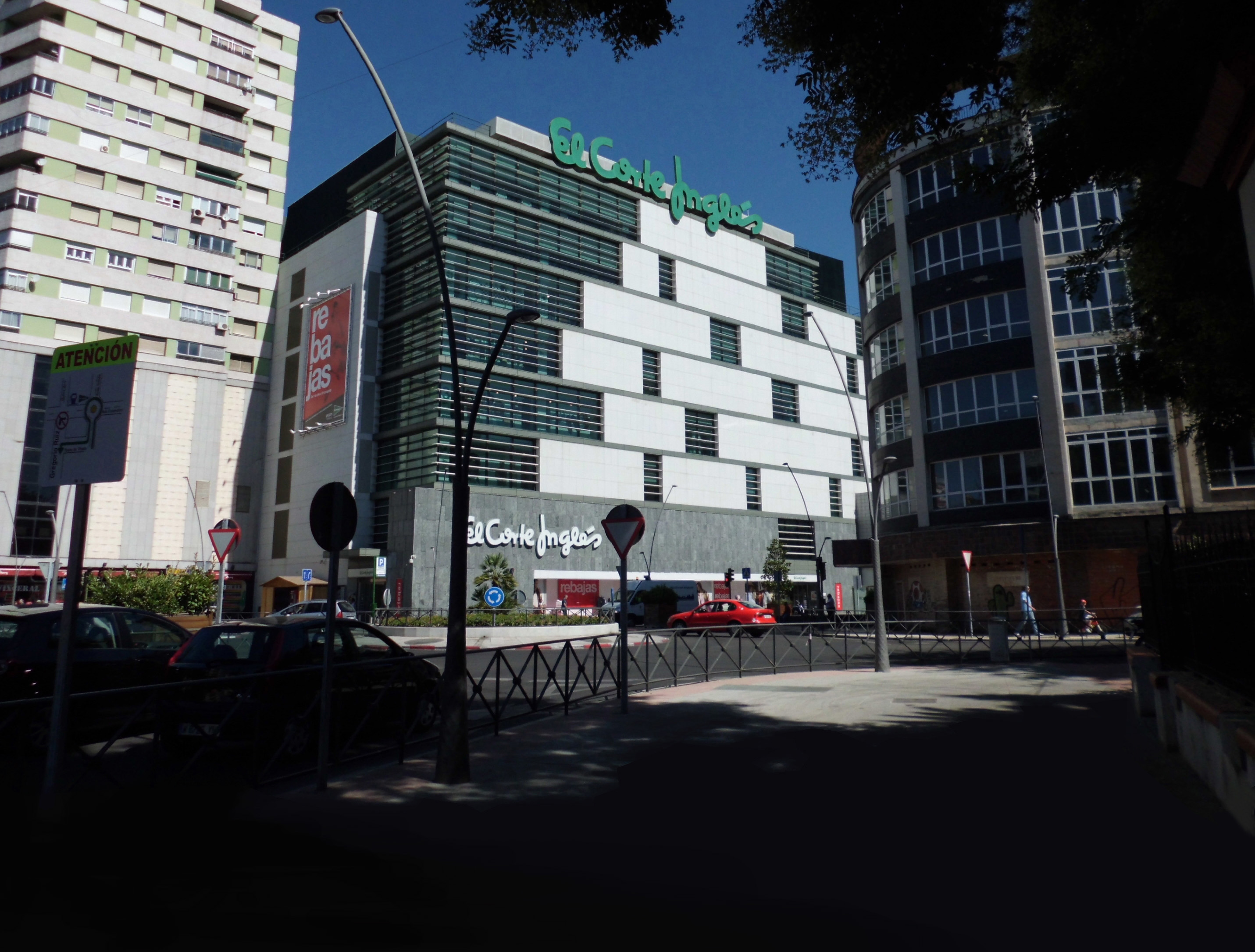 Glorieta en la que confluyen la Avenida Salvador Allende, la Avenida de Toledo y la Avenida de Extremadura, vista desde los arcos de los Jardines del Prado, en Talavera de la Reina. Por la izquierda confluye la Calle del Prado. Esta parte de la ciudad se encuentra en la zona centro y comercial.